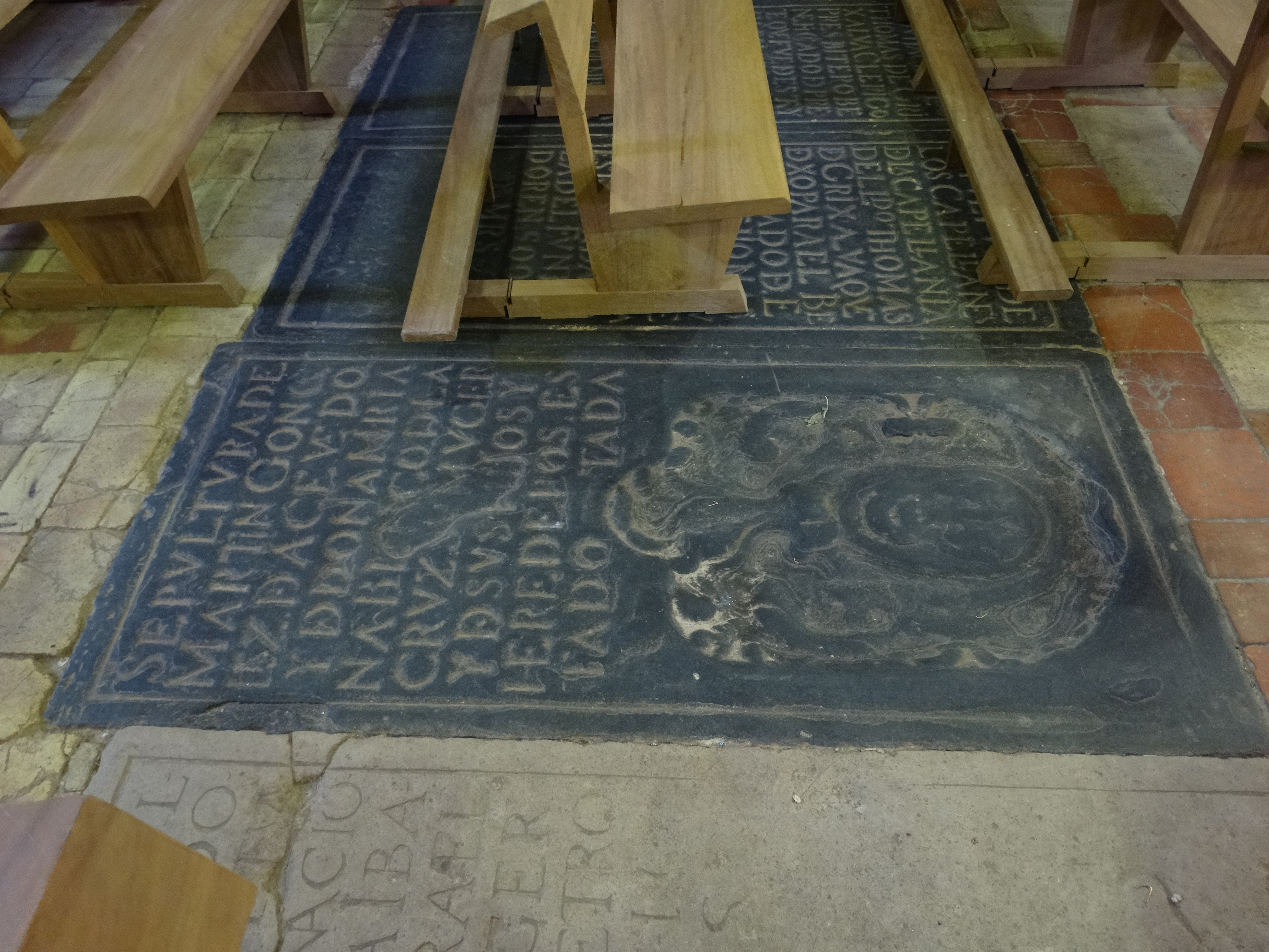 Torremormojón, provincia de Palencia, España. Iglesia de Santa María del Castillo. Lápida del enterramiento de Martín González Acevedo.